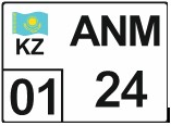 Номер прицепов Казахстана, стандарт 2012 года